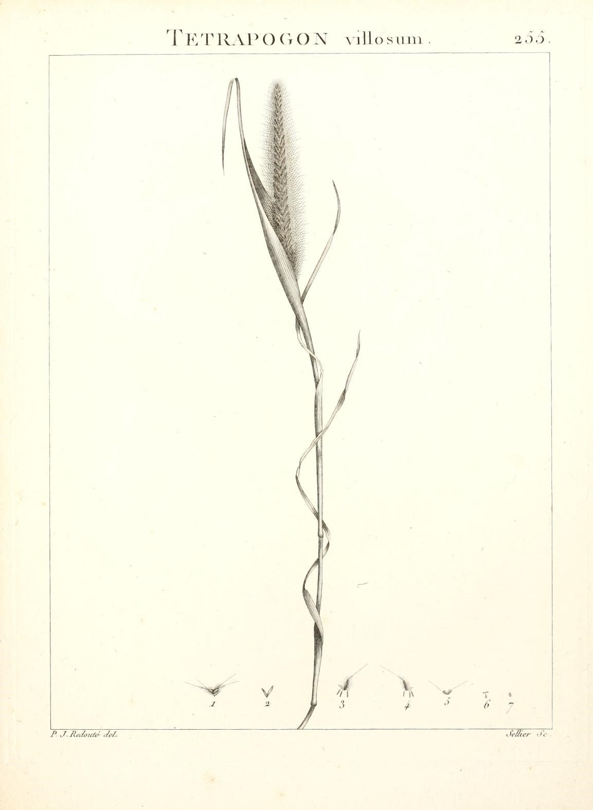 r I ^ rKTRAPO(H)N villosum 2.).. PJ.ReJo„/c ,/,•/.